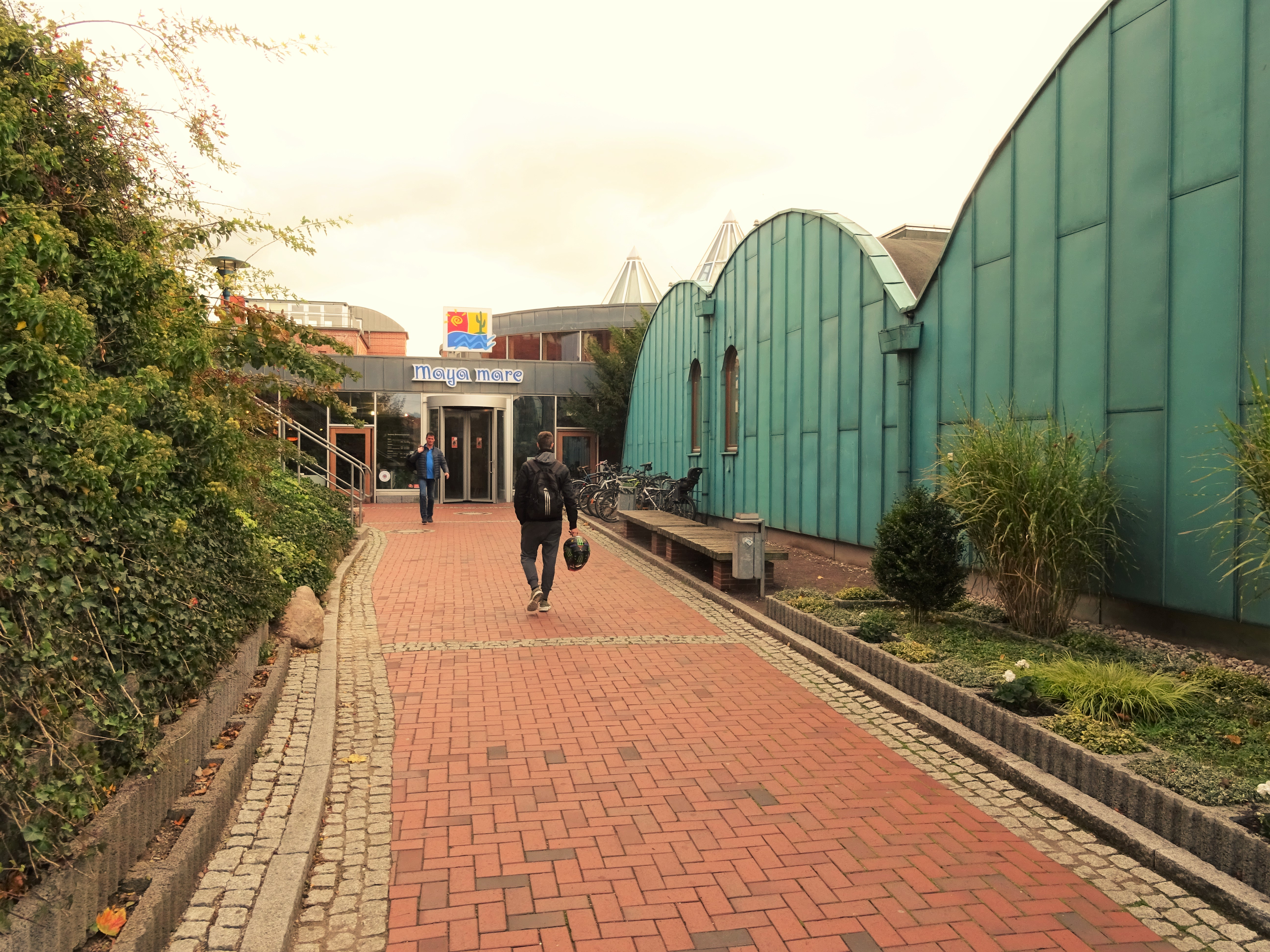 Der Haupteingang des Freizeitbads Maya Mare in Halle (Saale).